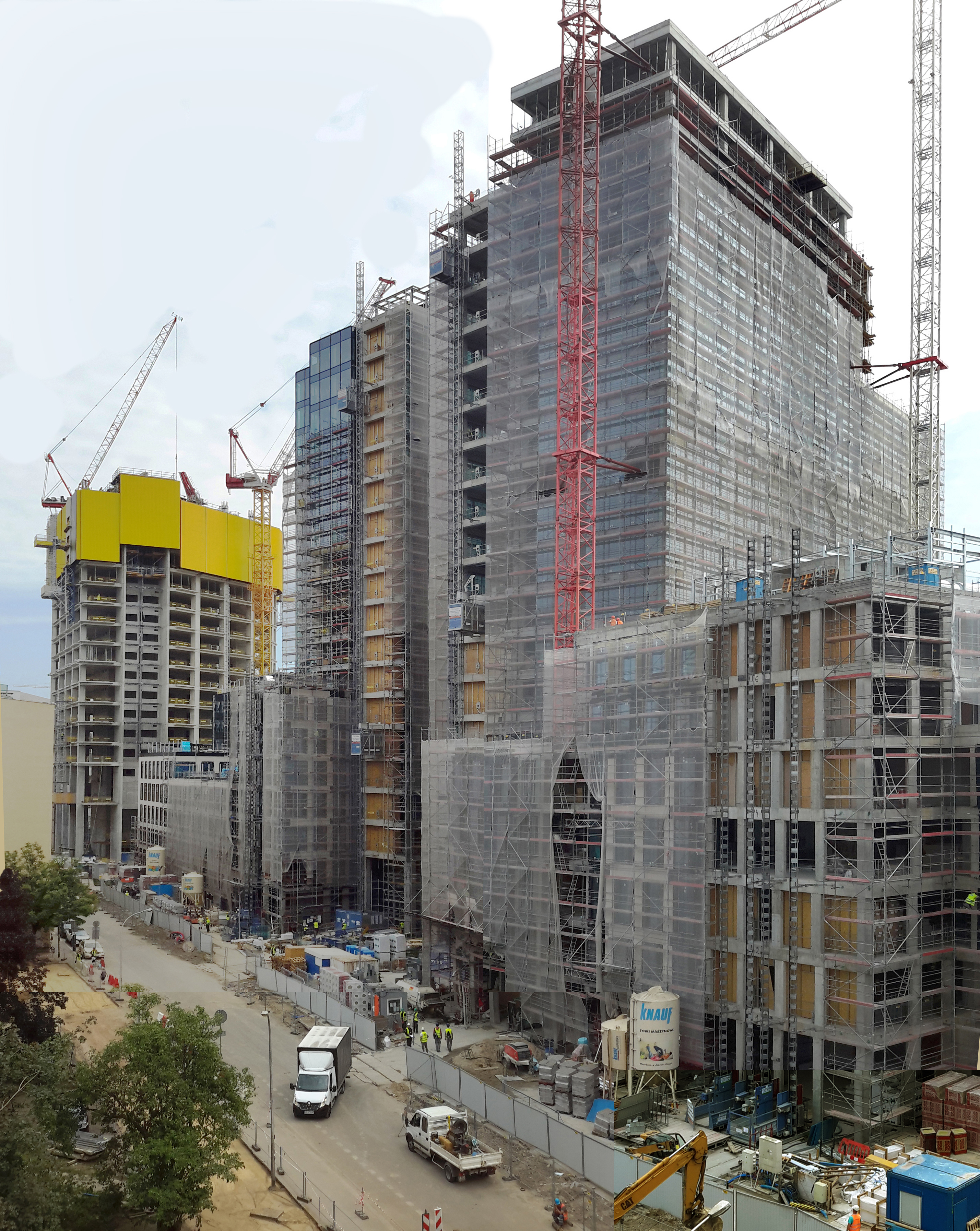 Plac budowy Varso 1 sierpnia 2019